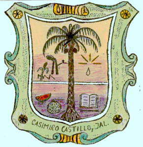 Stemma Casimiro Castillo